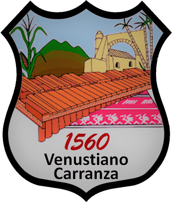 Escudo de Armas Venustiano Carranza Chiapas